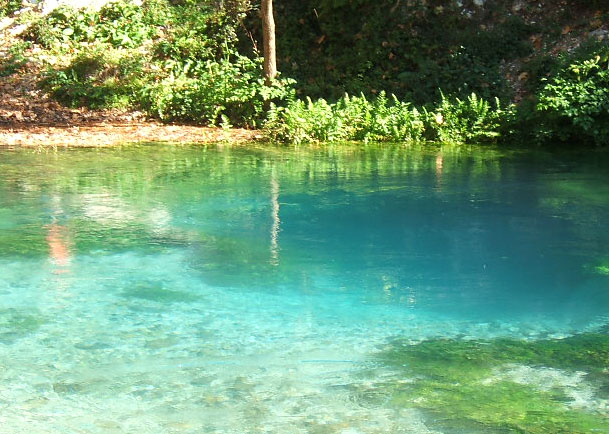 Quelle „Syri i Kalter“ (Blue Eyes) bei Delvina in Südalbanien Decius